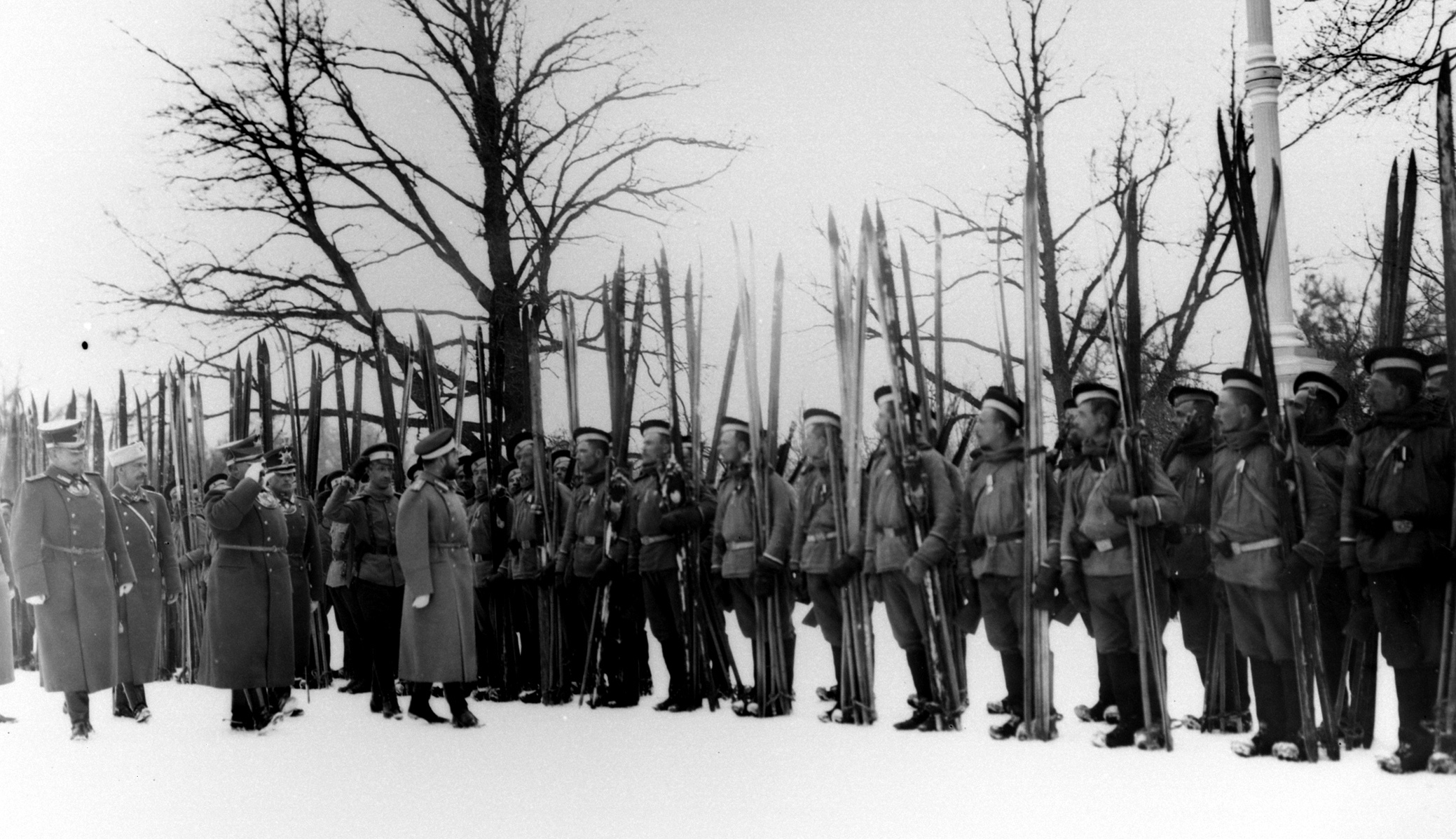 Николай II проводит смотр лыжников лейб-гвардии Измайловского полка (1914)